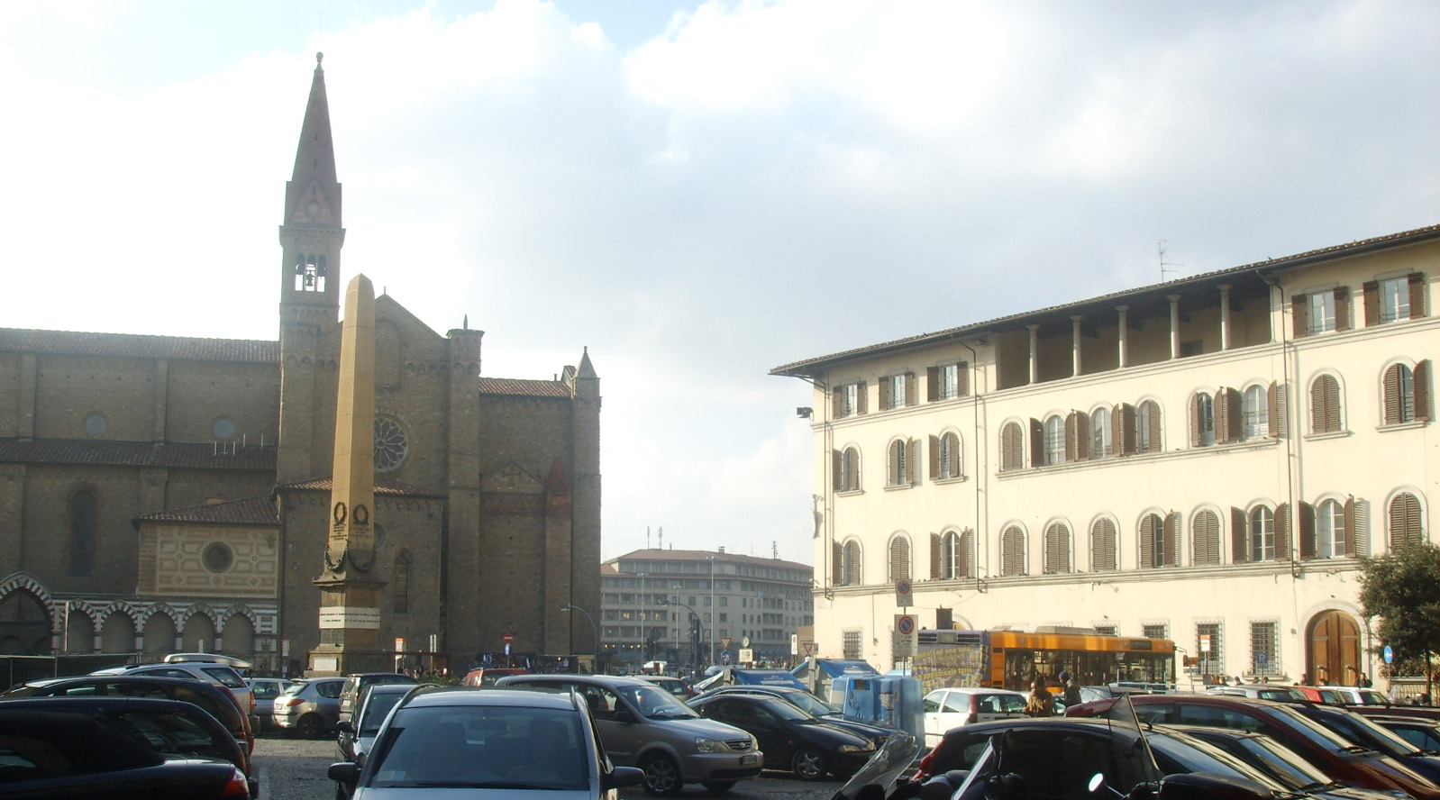 Piazza_dell'Unità_d'Italia